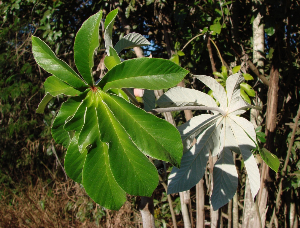 Cecropia pachystachya Trécul - URTICACEAE - tem como sin. het. Cecropia carbonaria, Cecropia catarinensis, Cecropia lyratiloba - Parque Olhos D'Água - Brasília - Distrito Federal - Brasil.